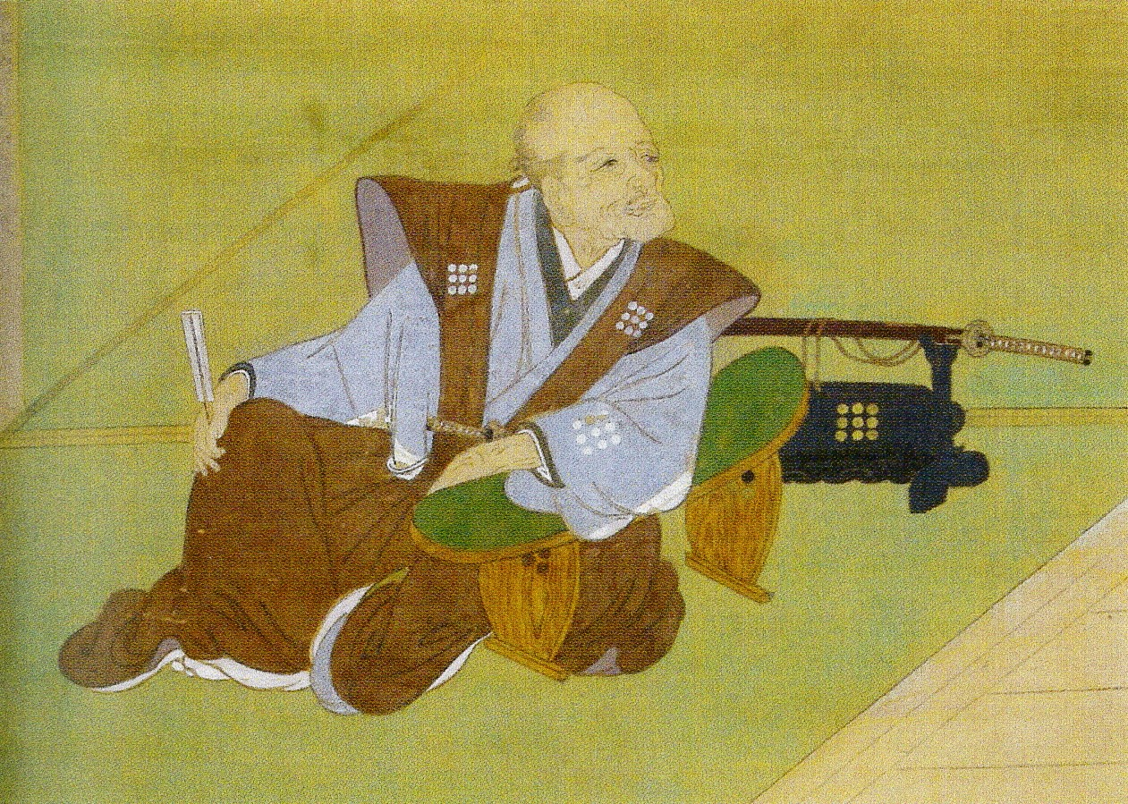 保科正貞の肖像。